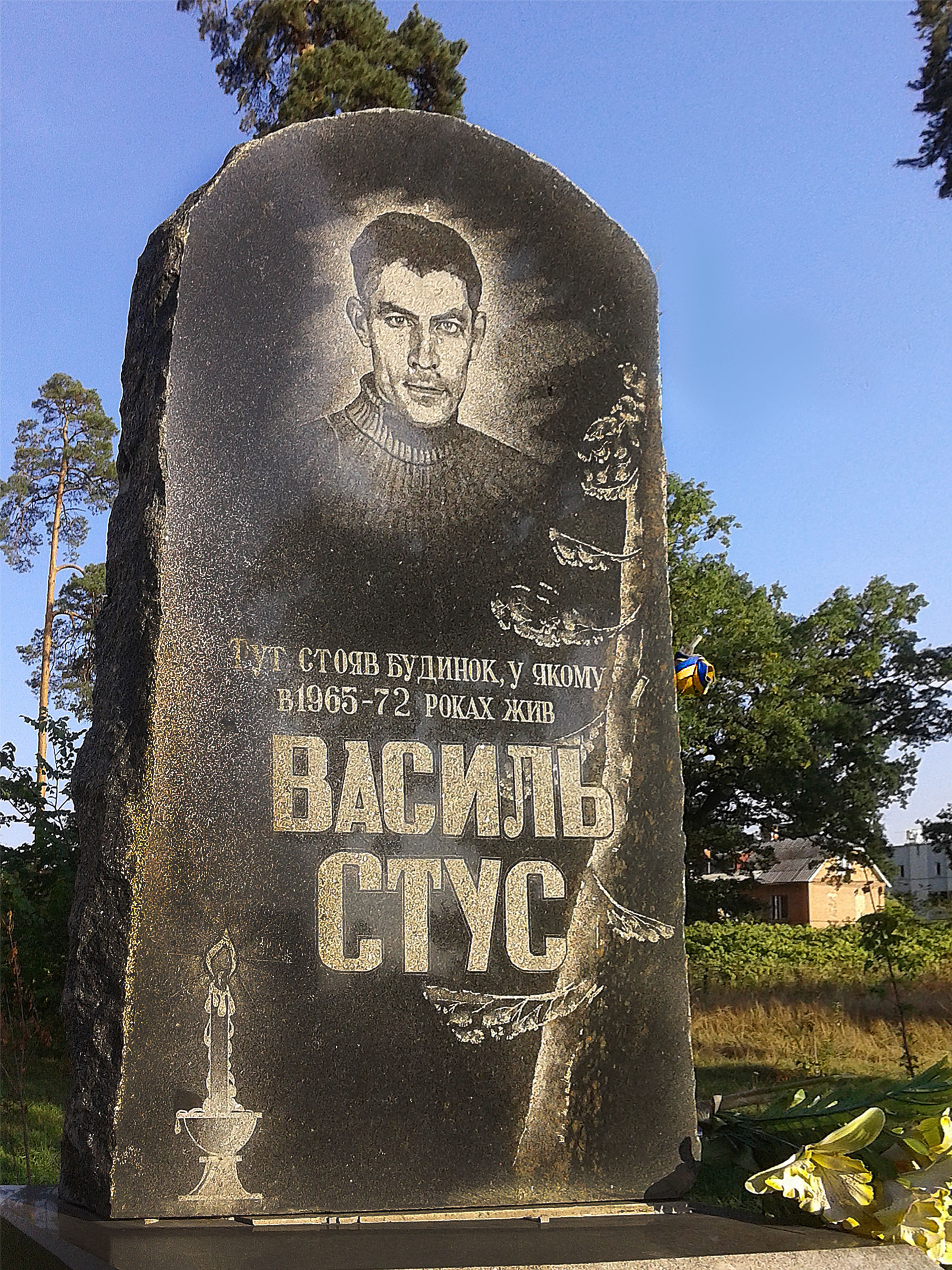 Пам'ятник Василю Стусу на місці будинку на пр. Перемоги, 119 (Київ), де він мешкав у 1965-1972 роках.